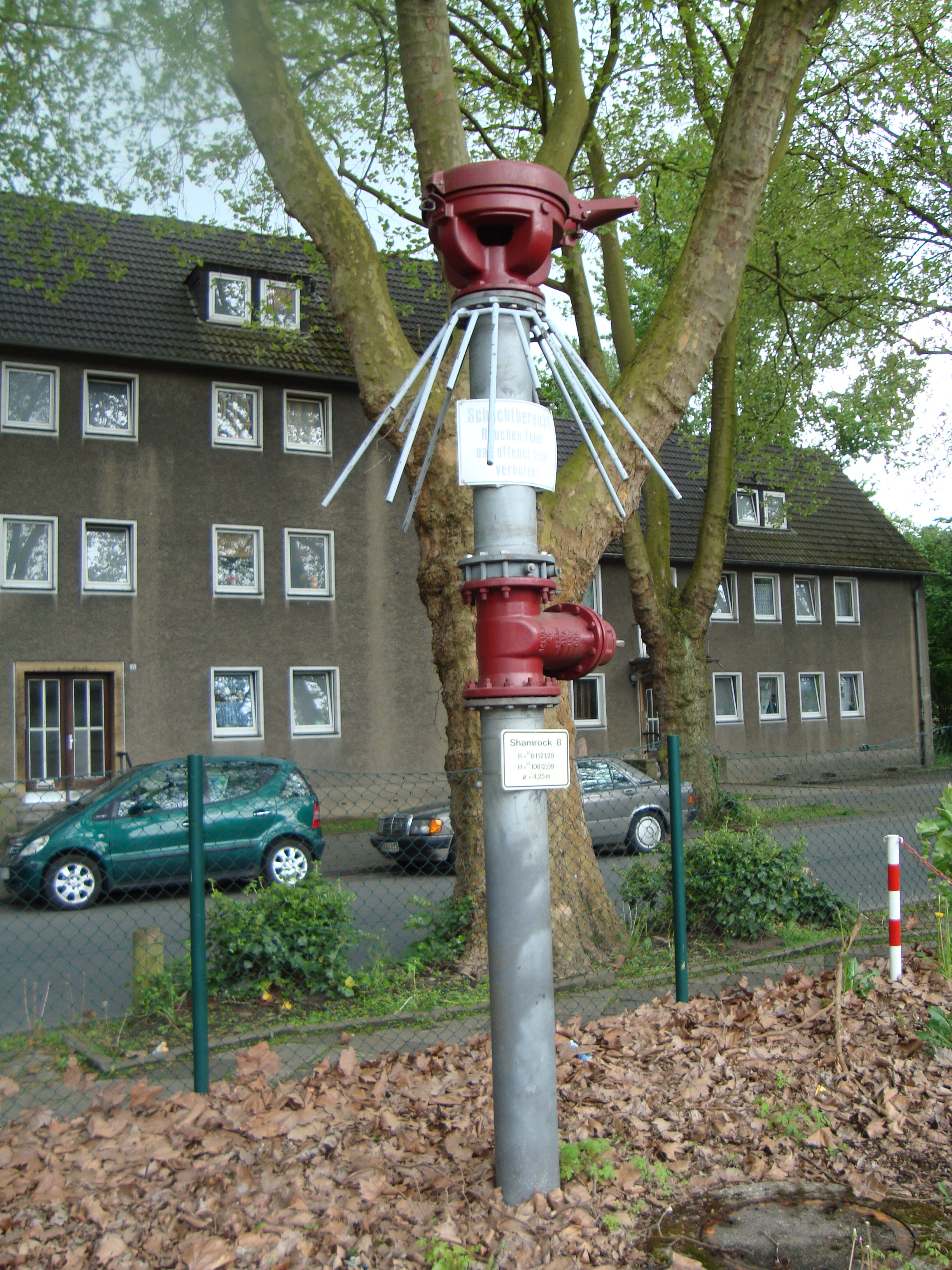 Protegohaube der Zeche Shamrock, Wetterschacht 8 in Herne